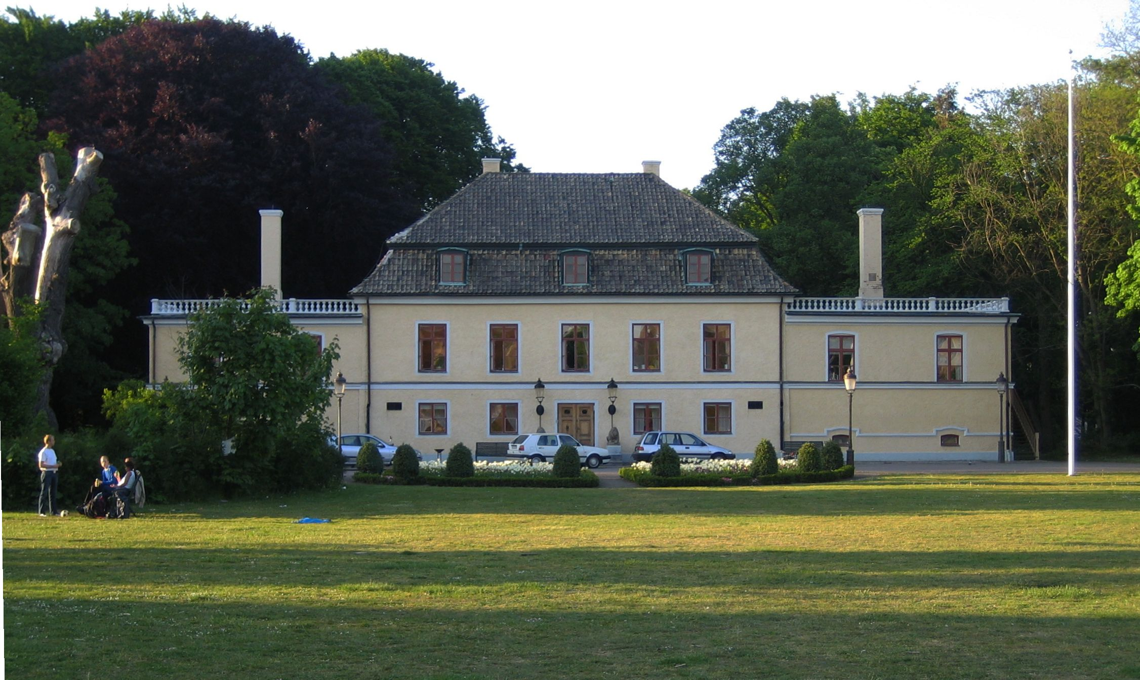 Rönneholmsgården in Malmö, Sweden.